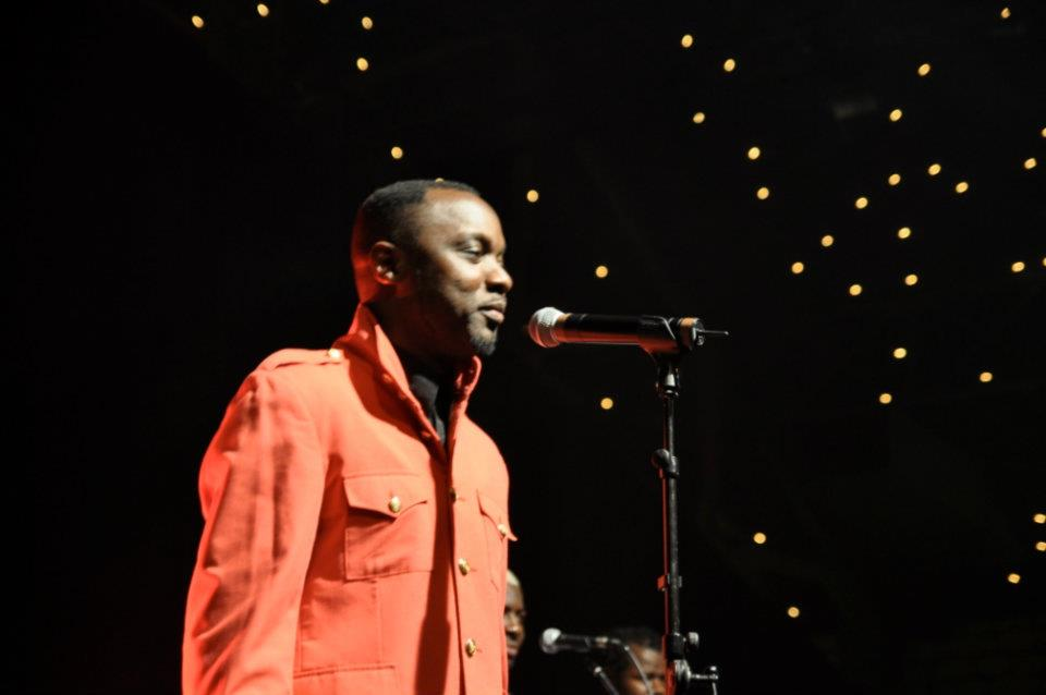 Le Turbo en plein spectacle